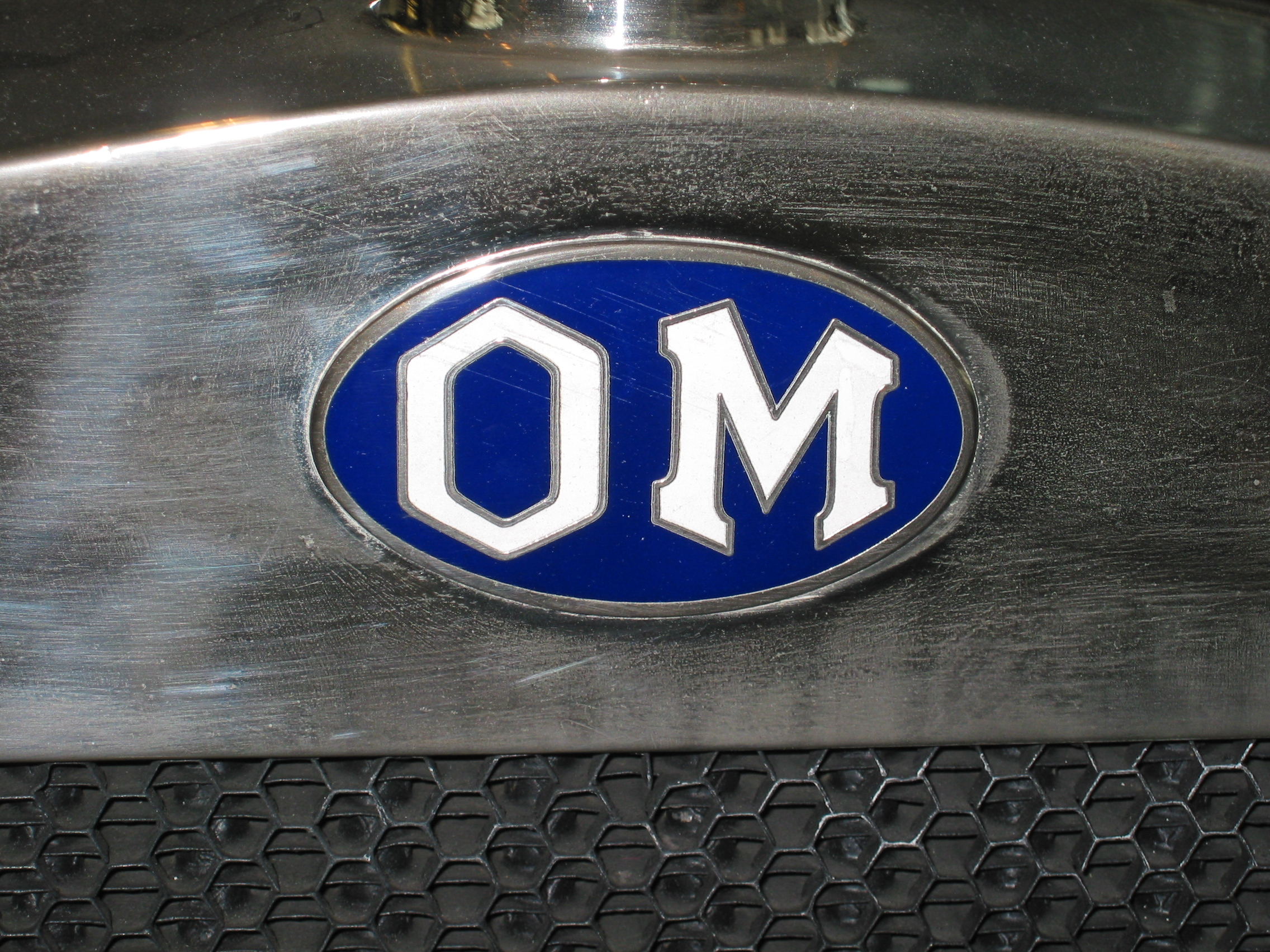 Emblem OM